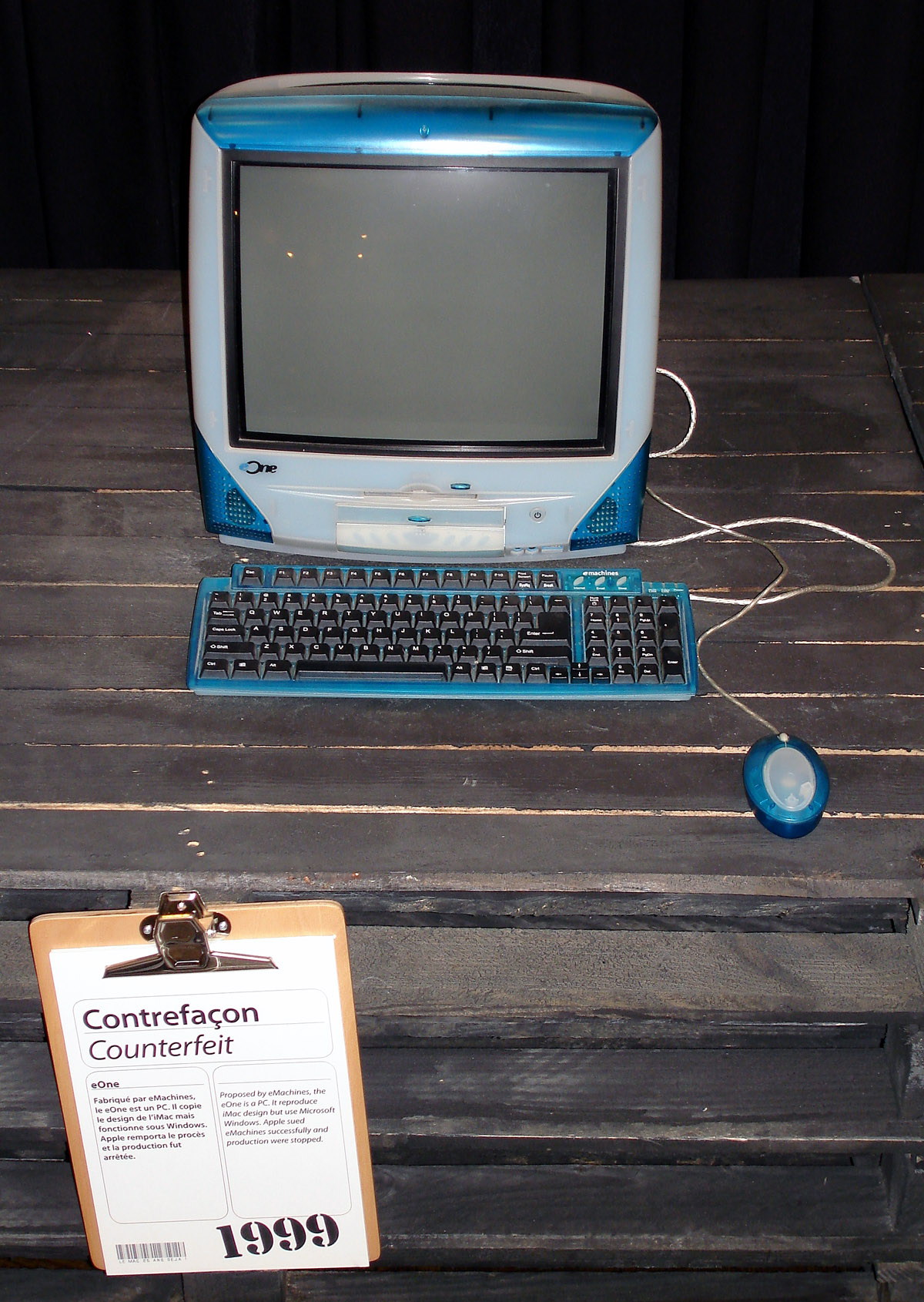 Exposition des 25 ans du Mac au musée de l'Informatique à La Défense, Hauts-de-Seine, France. eOne, PC fonctionnant sous Windows, contrefaçon du Macintosh, année 1999.